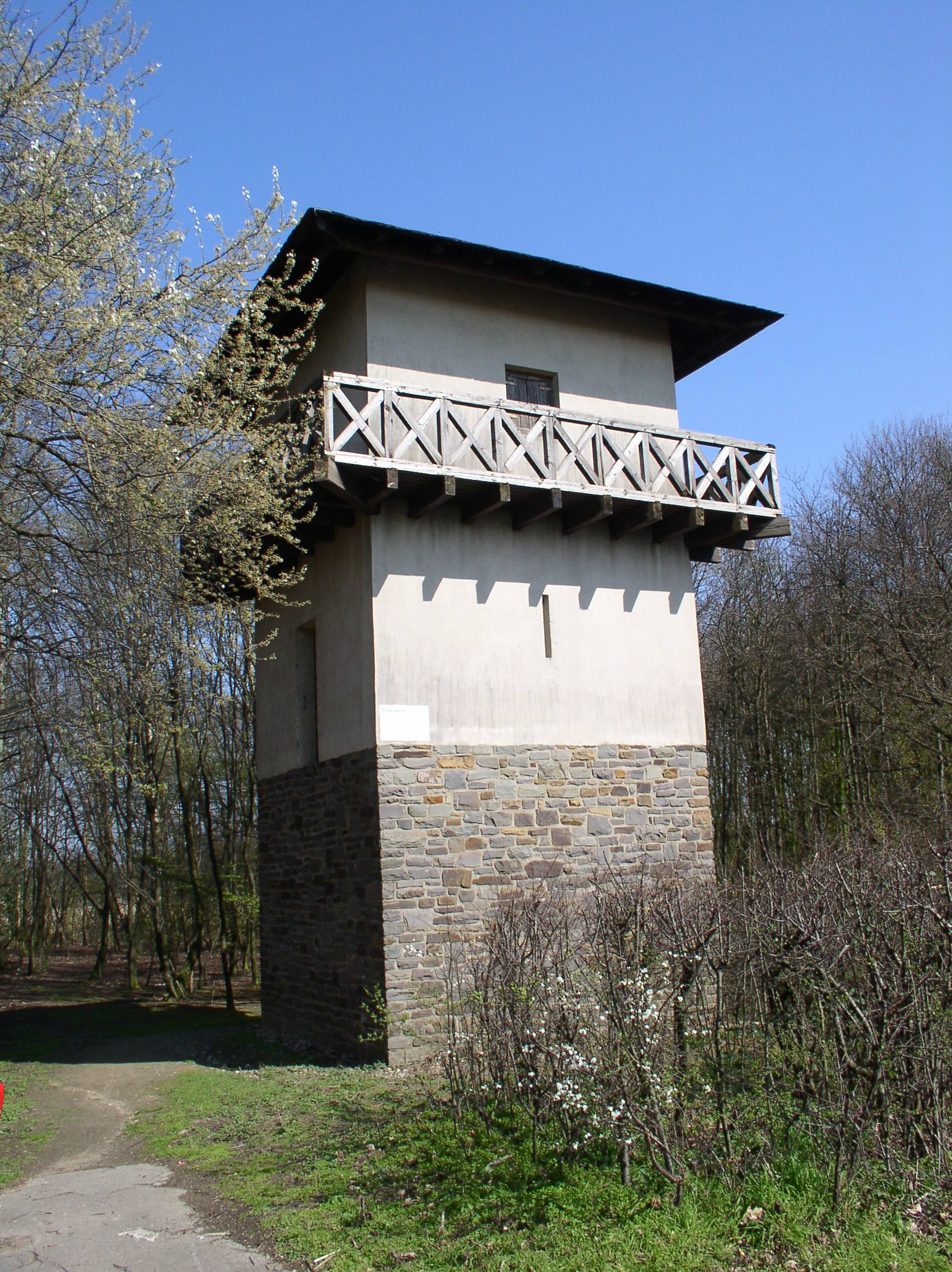 Rekonstruktion eines römischen Wachturms am Reckberg. Um 1900 ergraben und 1991 nahe der Fundstelle wiederrichtet.